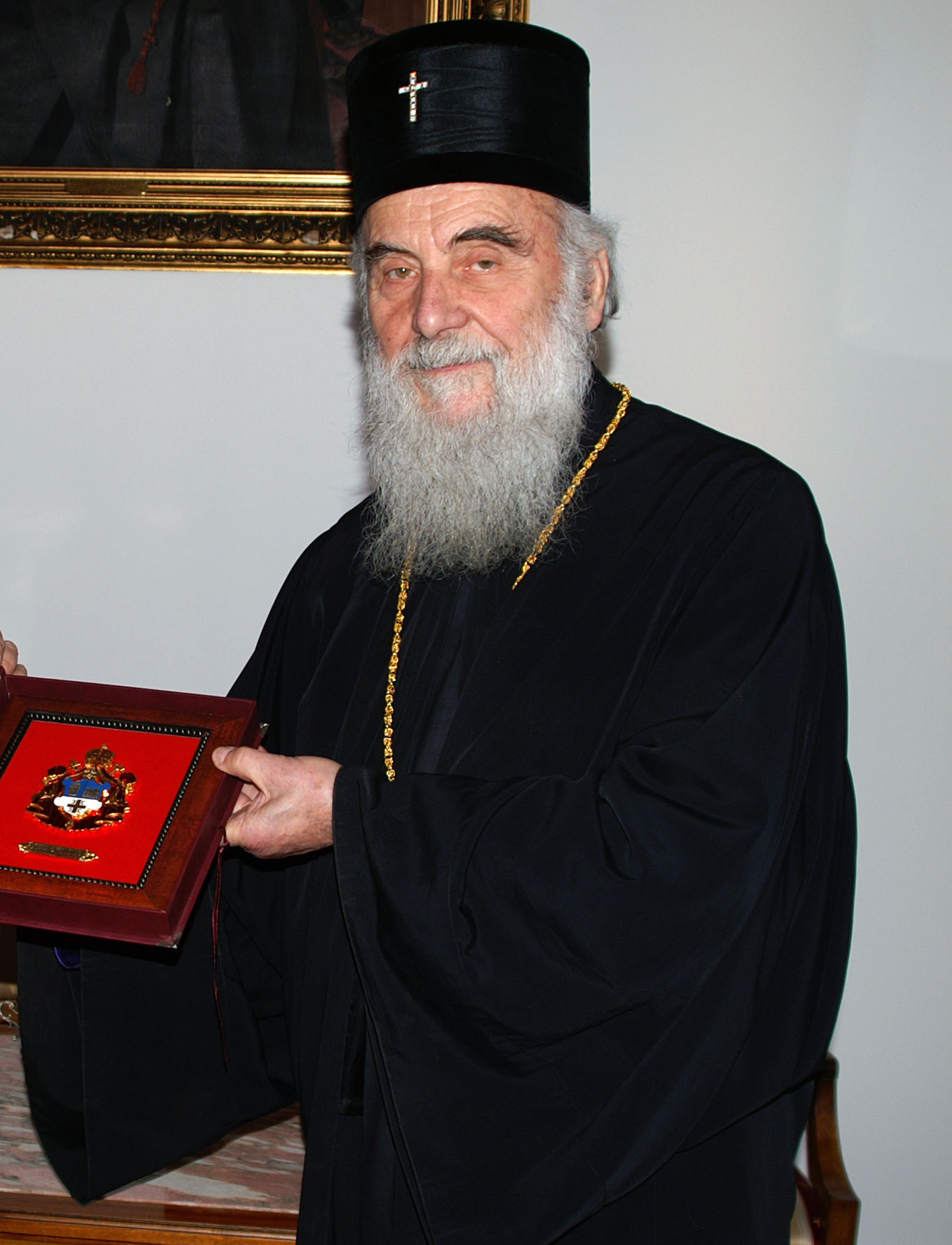 Την Τρίτη 31 Ιανουαρίου 2012, ο Υπουργός Εξωτερικών Σταύρος Δήμας επισκέφθηκε στο Βελιγράδι, προκειμένου να συμμετάσχει στην Άτυπη Σύνοδο Υπουργών Εξωτερικών της Διαδικασίας Συνεργασίας Νοτιοανατολικής Ευρώπης (Seecp). Επιπλέον, ο κ. Δήμας συναντήθηκε με τον Πρόεδρο της Σερβίας Μπόρις Τάντιτς στο Προεδρικό Μέγαρο, ενώ θα πραγματοποιήσει συνομιλίες με τον Σέρβο ομόλογό του Βουκ Γέρεμιτς στο σερβικό Υπουργείο Εξωτερικών. Τέλος, κατά τη διάρκεια της επίσκεψης του, ο κ. Υπουργός συναντήθηκε με τον Πατριάρχη Σερβίας Ειρηναίο και θα παρακάθισε σε γεύμα με τα μέλη του Προεδρείου του Συνδέσμου Ελληνικών Επιχειρήσεων, ενώ επισκέφθηκε και τον πύργο Νεμπόισα, ο οποίος αναστηλώθηκε με χρηματοδότηση του Ελληνικού Κράτους.